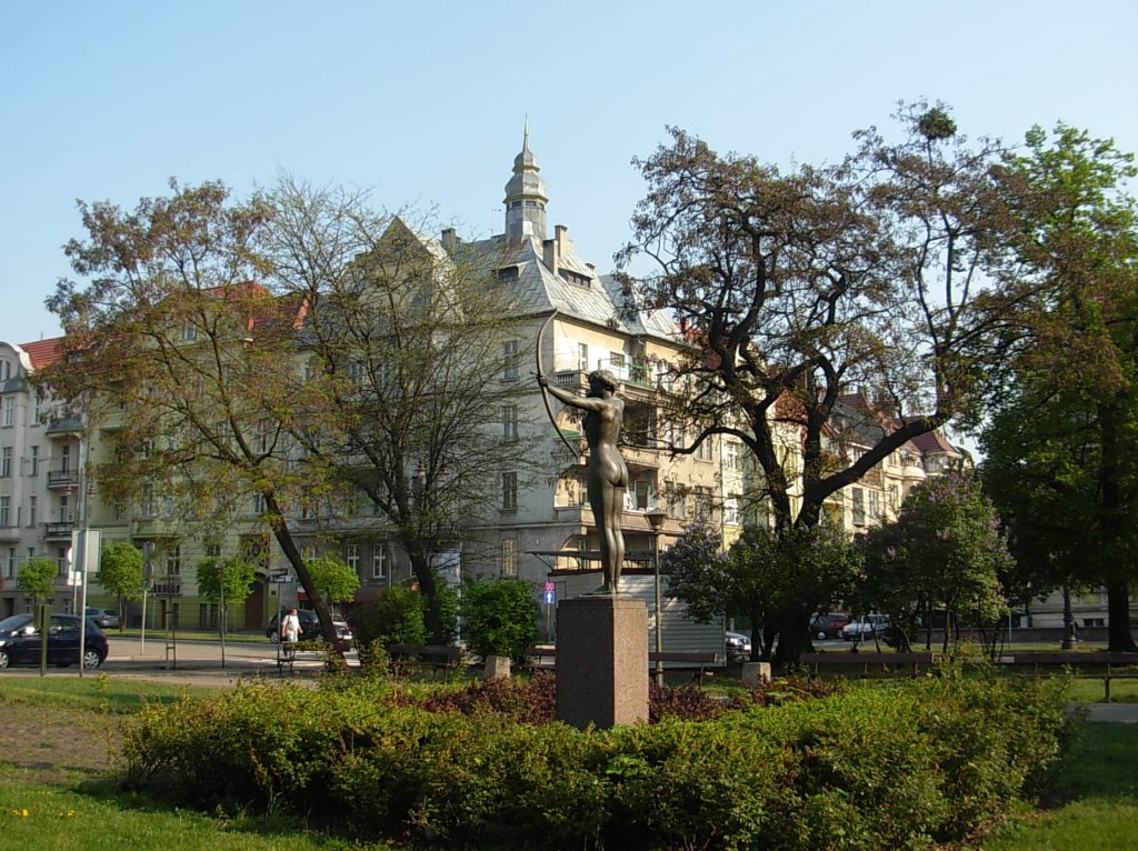 Łuczniczka w parku Jana Kochanowskiego w Bydgoszczy